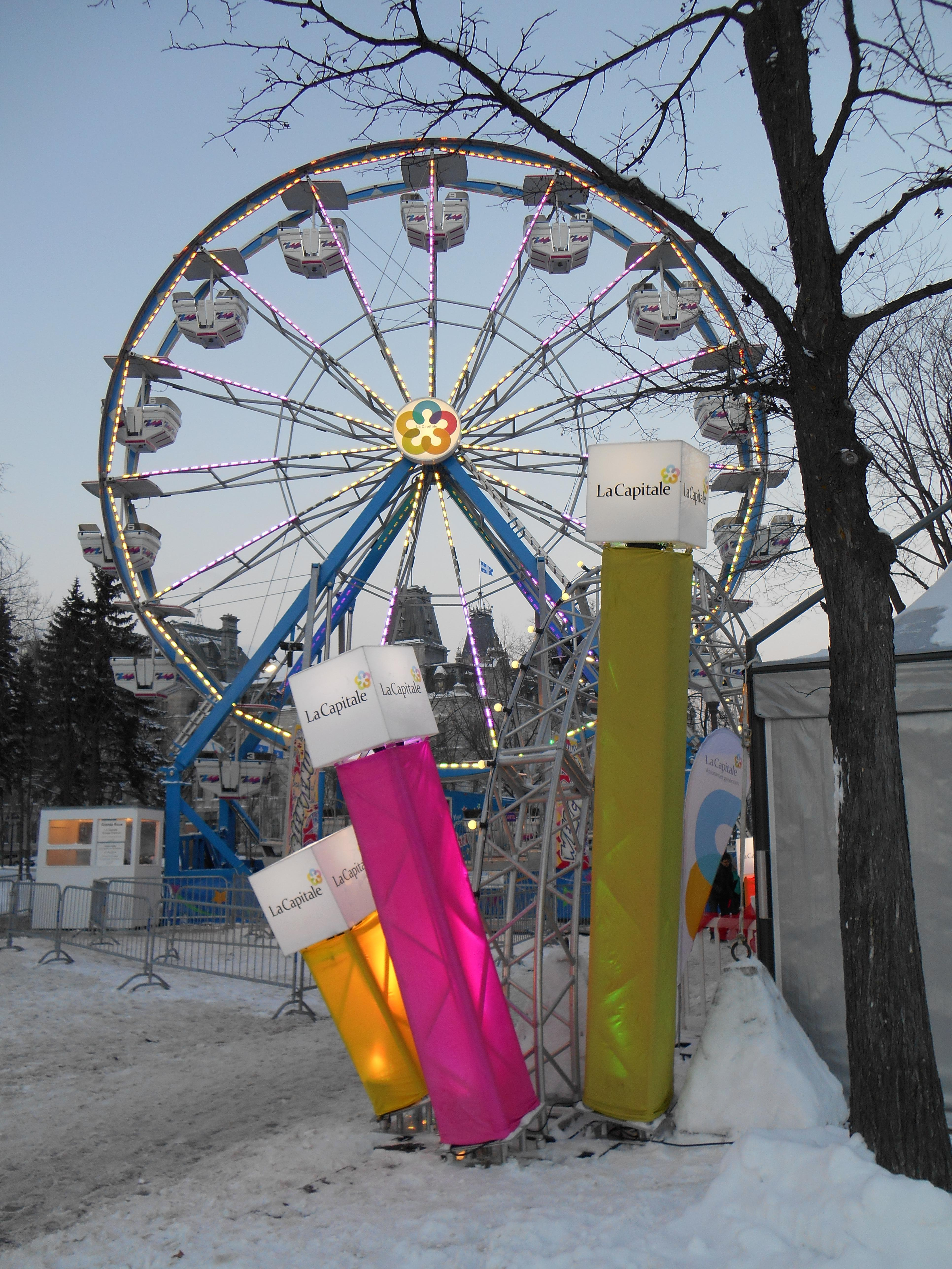 Grande roue, Grande Allée, Québec